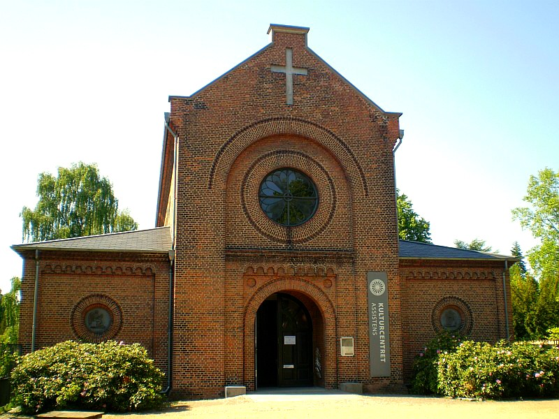 Kulturcentret Assistens at Assistens Cemetery in Copenhagen, Denmark. 1867-68 by Valdemar Ingemann.